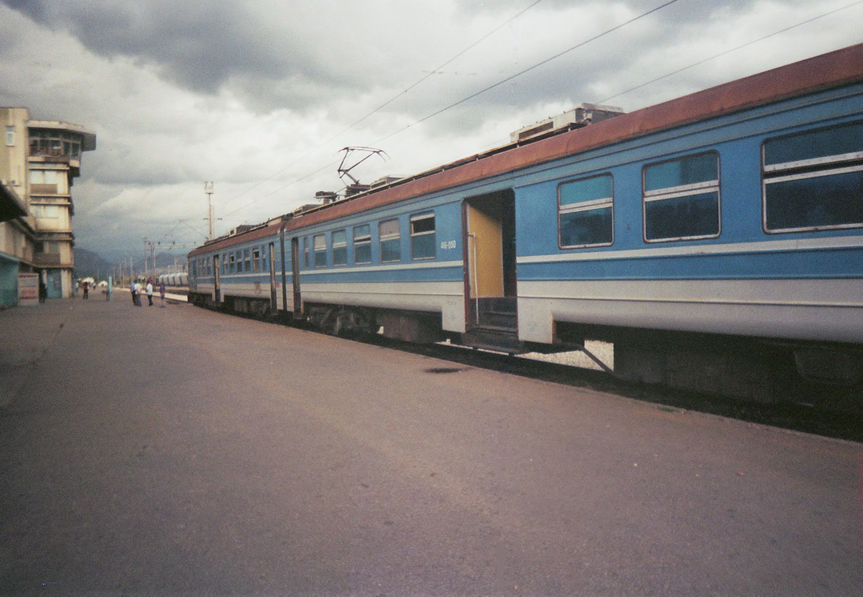 Train in Podgorica station montenegro